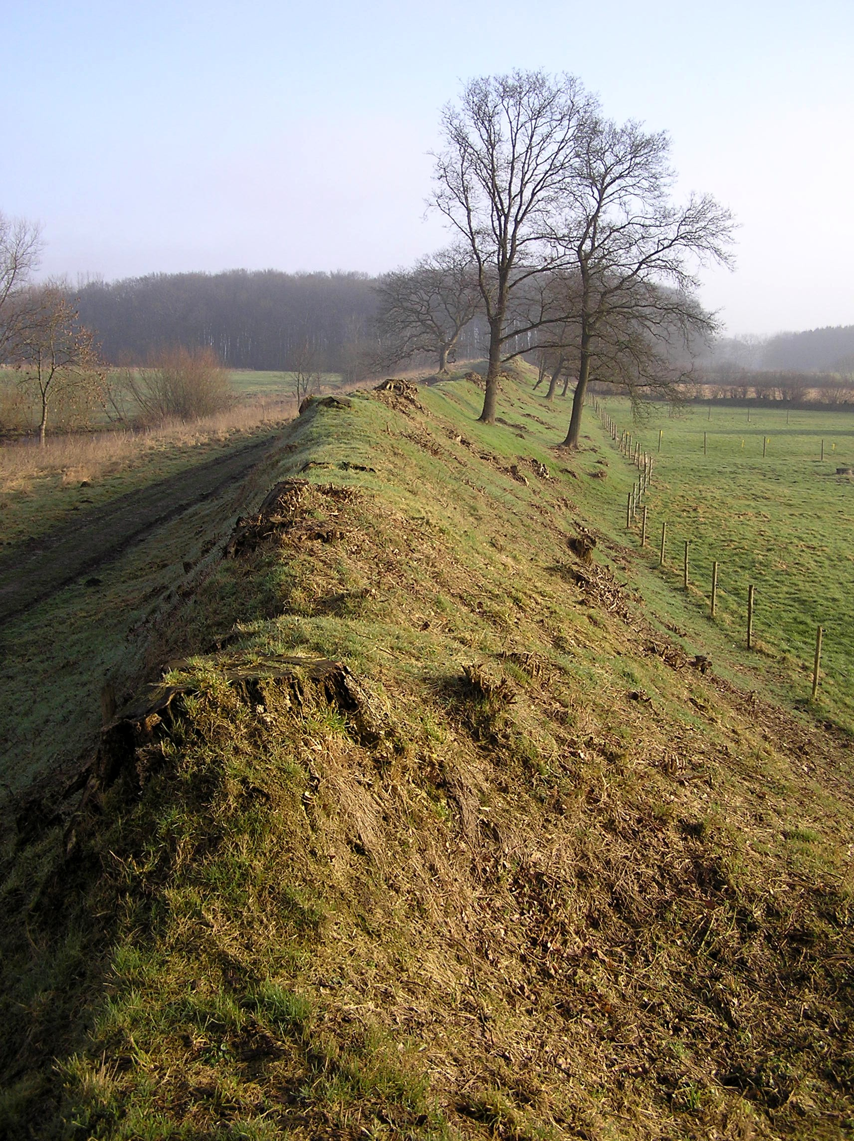 Danewerk östlich des Ortes Dannewerk